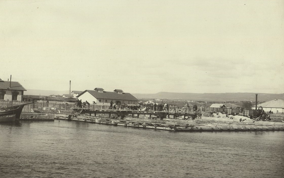 Строежът на хелинга на военната флота в Пристанище Варна, близък план.